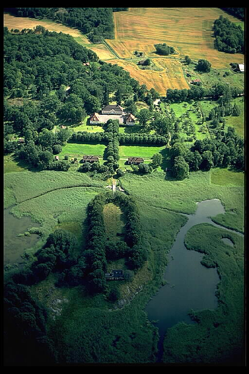 Motiv: Engelholm Nyckelord: Byggnadsminnen, Flygbilder, Riksintressen Kategori: Herrgårds-/slottslandskapEngelholm